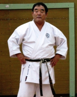 Sensei Fumio Demura - picture taken in Warsaw, Poland, on Genbu-kai karate seminar (November 2006).